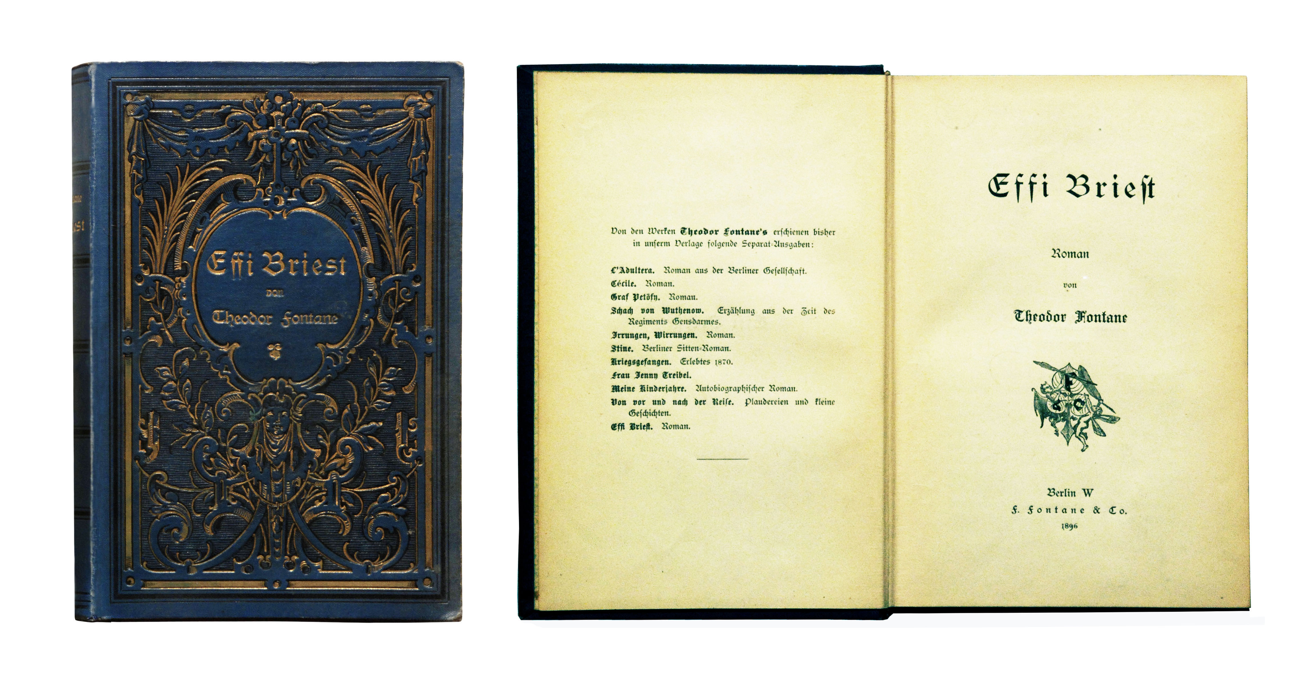 Fontane, Theodor: Effi Briest. Roman. Verlagseinband und Titelblatt der Erstausgabe 1896.